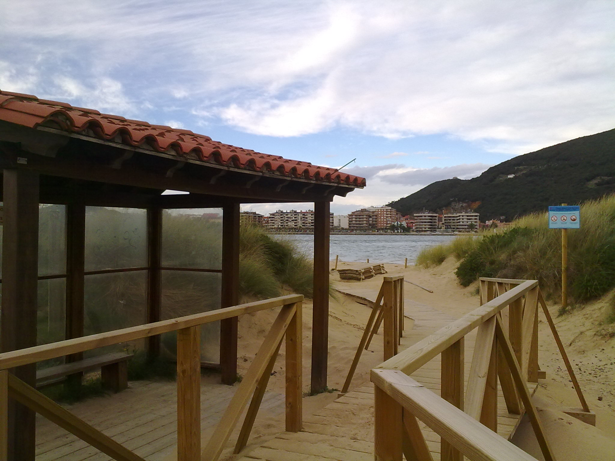 El puntal de Laredo